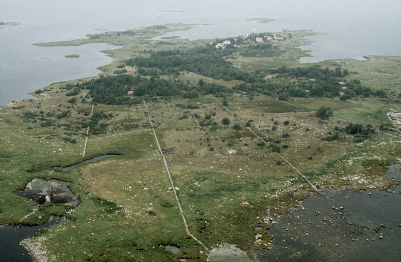 Bilden är tagen mot (väderstreck): NNV Motiv: Långören Nyckelord: Flygbilder, Riksintressen Kategori: Skärgårdsby, Kust- och skärgårdsmiljöBilden är tagen mot (väderstreck): NNV.